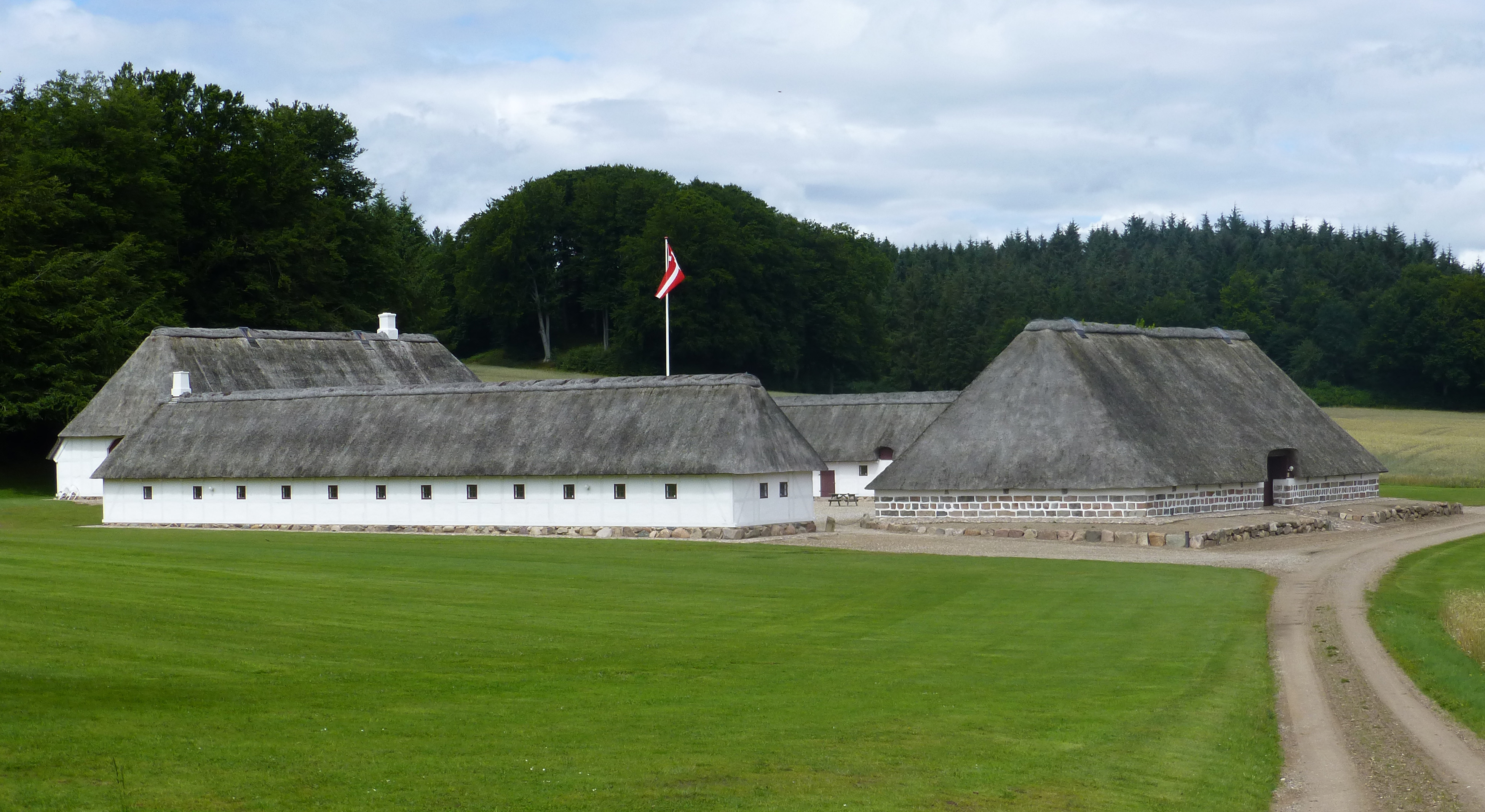 Uldrupgård set fra syd